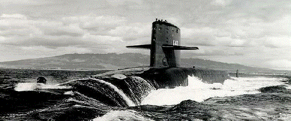 SSBN 640 USS Benjamin Franklin